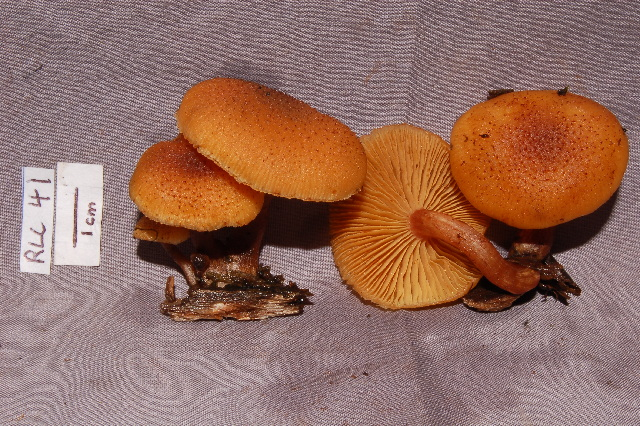 Gymnopilus lepidotus